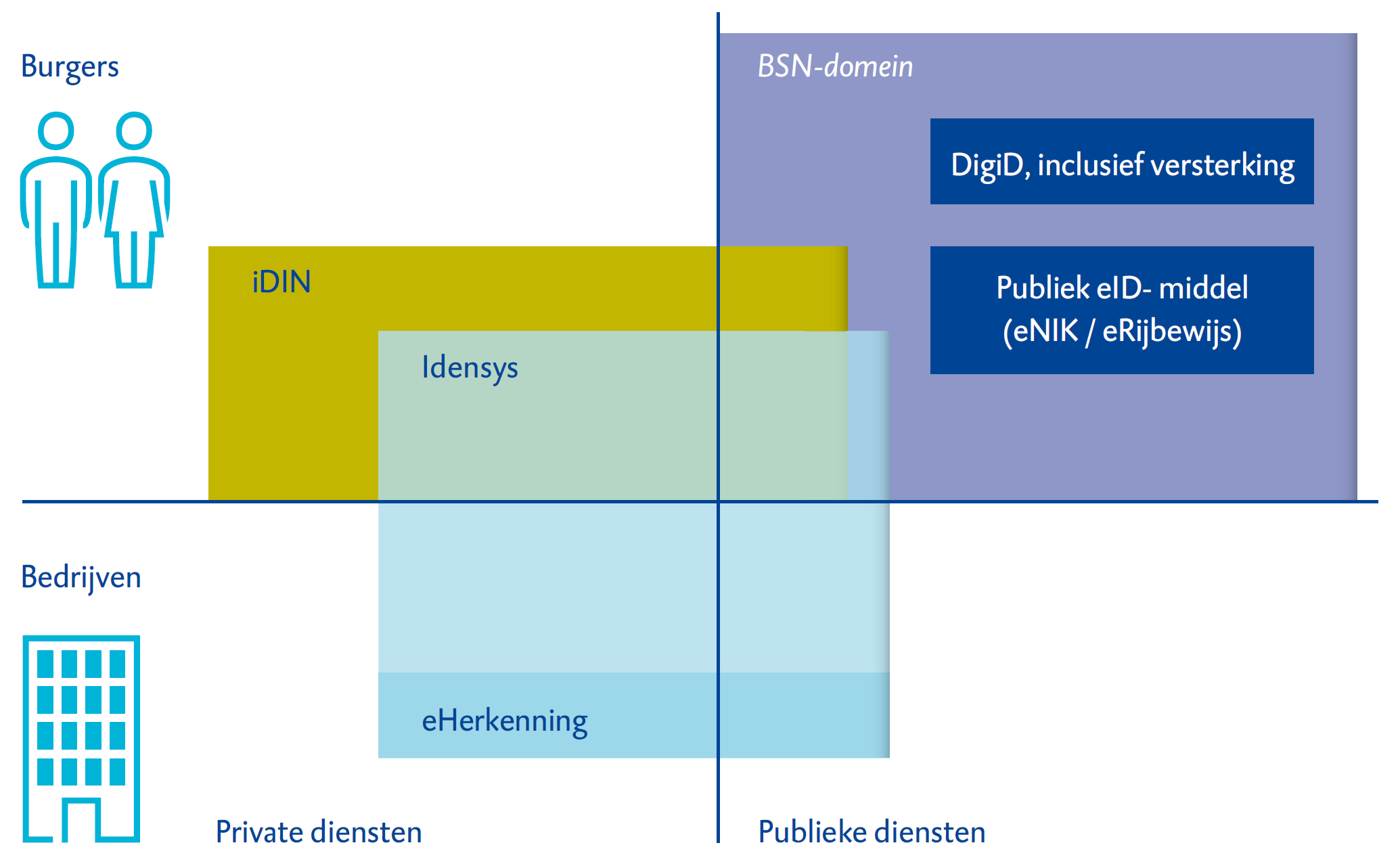 Een beeld van de verschillende domeinen en van de (bestaande en nieuwe) authenticatiemiddelen voor: • burgers en/of bedrijven; • private online-diensten (bijvoorbeeld elektronisch bestellen bij webshops) en/of publieke online diensten (zoals bijvoorbeeld het aanvragen van toeslagen).